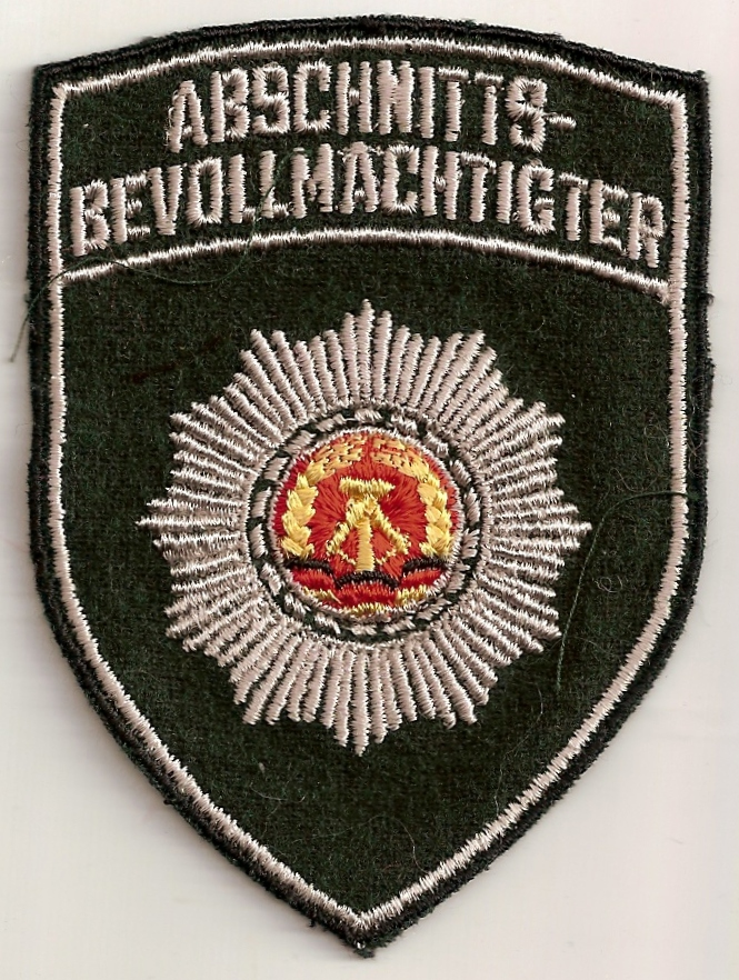 DDR politie